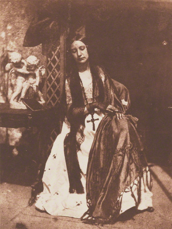 Elizabeth Eastlake (fotografata nel 1845 da Hill & Adamson)